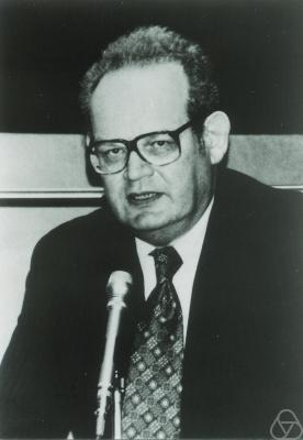 Benoît Mandelbrot, mathématicien français